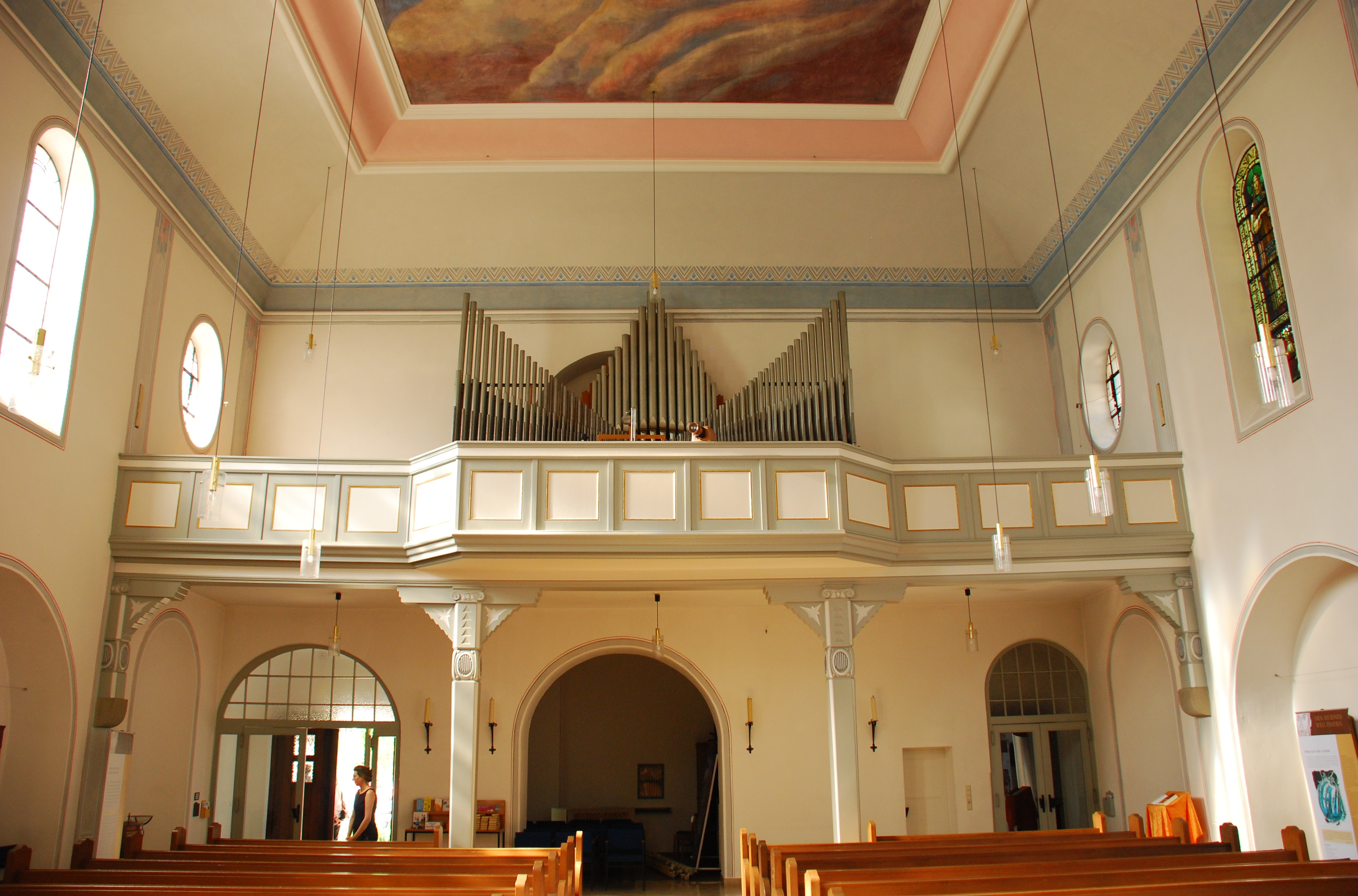 Empore der katholischen Pfarrkirche St. Johannes der Täufer in Sankt Goarshausen, Rhein-Lahn-Kreis, Rheinland-Pfalz. Bauwerk als Denkmal im nachrichtlichen Verzeichnis der Kulturdenkmäler Rhein-Lahn-Kreis aufgeführt.